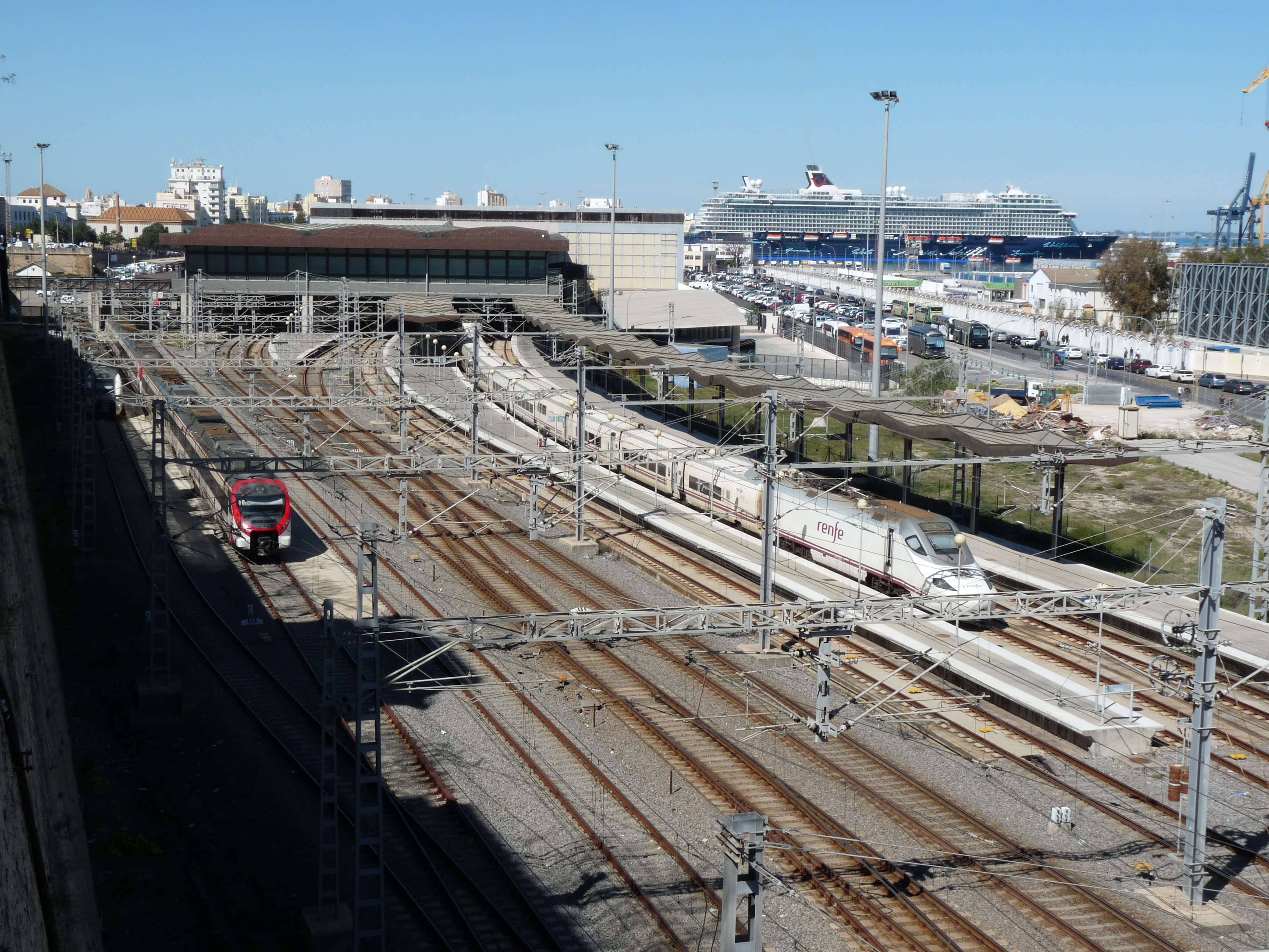 Het treinstation van Cádiz